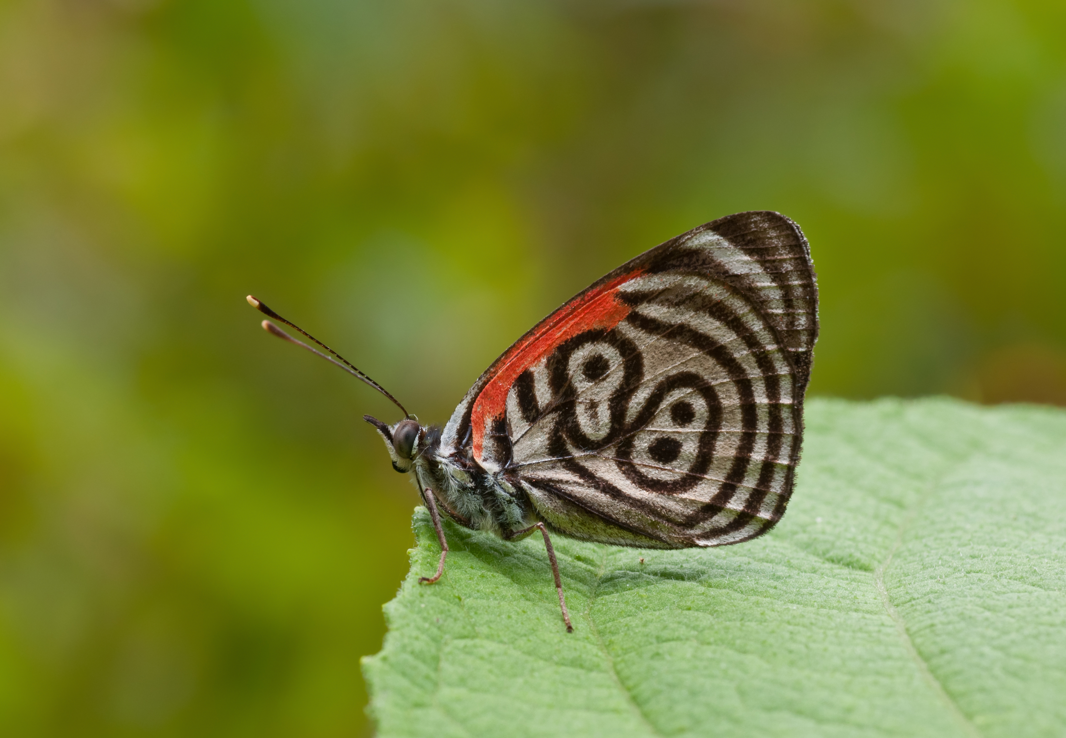 Diaethria marchalii in the wild, in the Andes mountains in Venezuela.